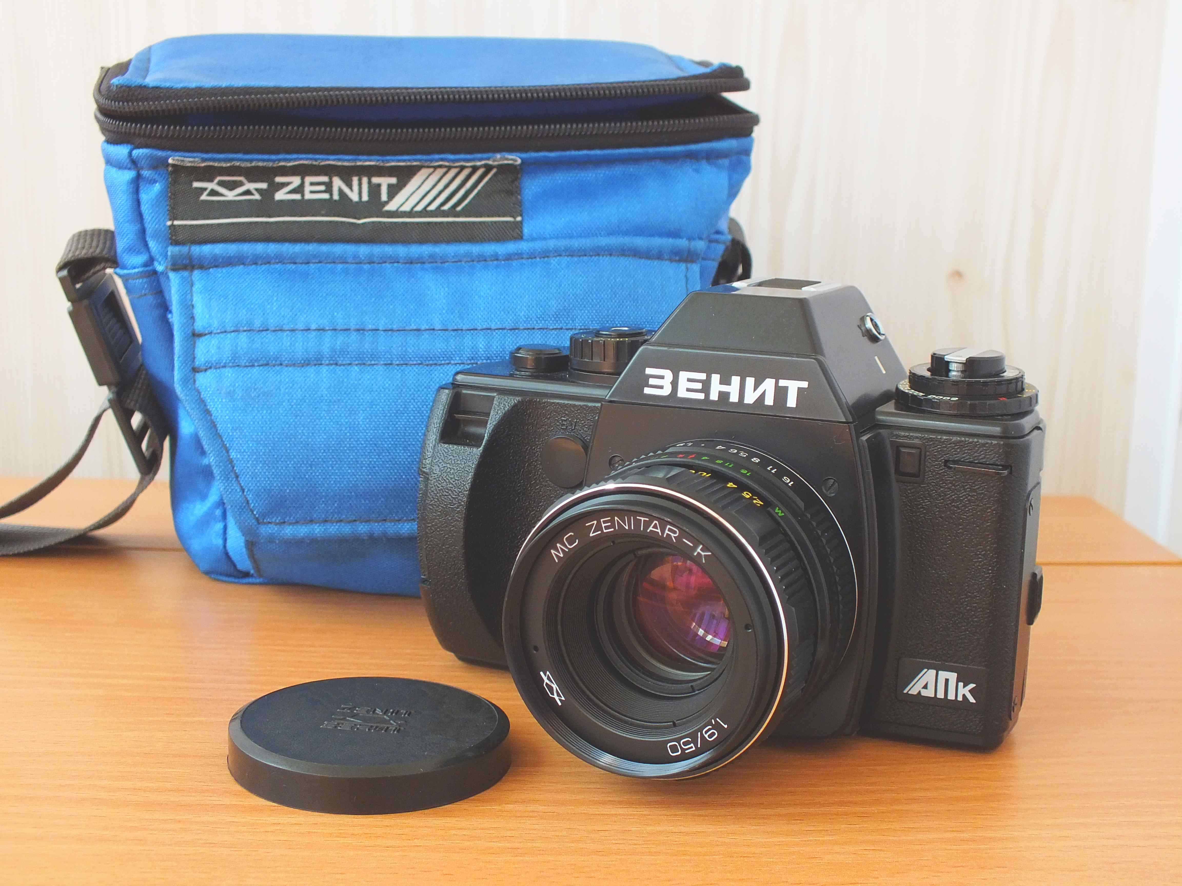 Фотоппарат ЗЕНИТ АПК с объективом МС Зенитар-К 50 мм f/1.9. Электрическое дистанционное управление. 35 мм зеркальная камера с ручным и автоматическим режимом экспозиции. Крепление объектива: Байонет "К" (PENTAX).Фокусировки ручная. Фокусировочный экран с клиньями Додена, кольцом микропризм и матовой поверхностью.Затвор фокальный ламельный металлический с вертикальным перемещением ламелей. Диапазон выдержек: 1/2000-1сек., В. Синхронизация со вспышкой на 1/125 сек. Измерение экспозиции по системе ТТL, интегральный, со светодиодной индикацией в визире. Режимы отработки экспозиции: Ручной и автоматический c приоритетом диафрагмы. Экспокоррекция:2 экспозиционные ступени. Многократное экспонирование. Видоискатель:92% от площади кадра. Информация в видоискателе: 3 светодиода, обозначающие недодержку, передержку и правильную экспозицию. Ручная протяжка пленки. Диапазон светочувствительности пленки: ISO 25-1600. Просмотр глубины резкости. Автоспуск: Электрическое дистанционное управление. Ручная обратная перемотка пленки. Питание: 6 В от 4-х элементов типа 2БЛИК1, 625А, РХ625 (Mallory), EРХ625 (UCAP) или один элемент типа РХ28 (Mallory), 544 (UCAP). Вес 770г.